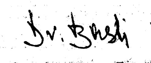 Signatur des Mediziners Günter Bast (1922–1997)